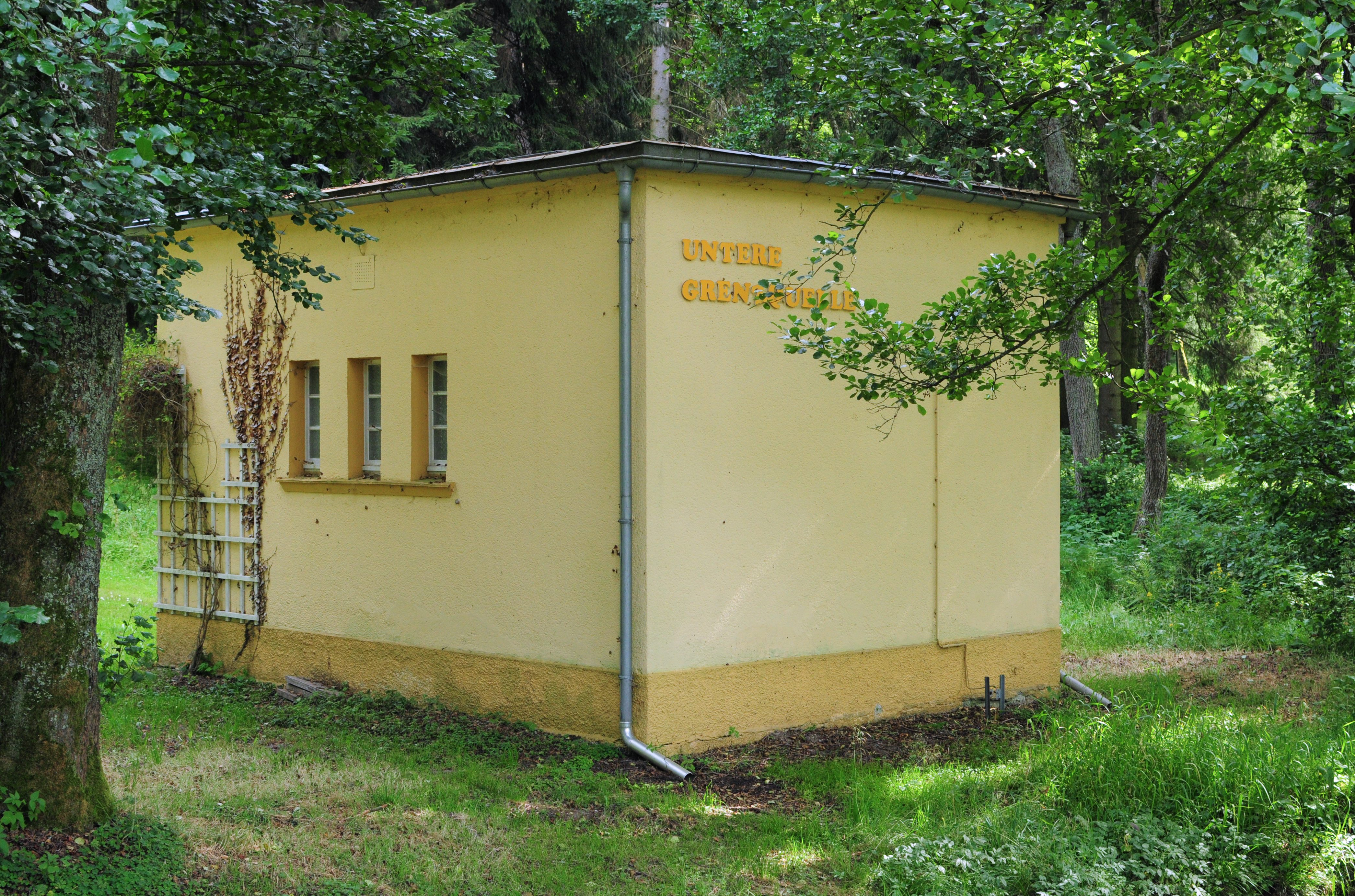 Gemeinde Bad Brambach, Kurpark Bad Brambach, Untere Grenzqelle (Vogtlandkreis, Freistaat Sachsen, Deutschland)